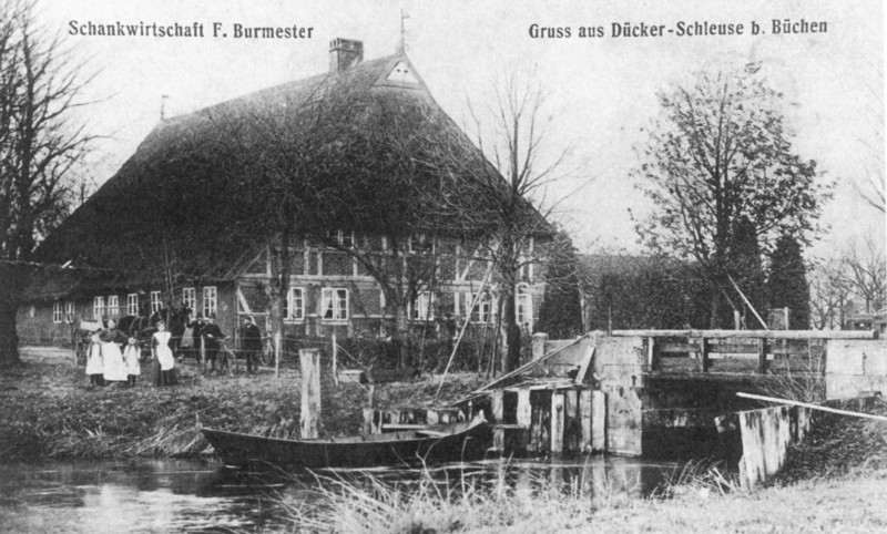 Dückerschleuse am Stecknitz-Kanal bei Witzeeze (Blick nach Nordwesten, vom Mecklenburgischen Ufer)